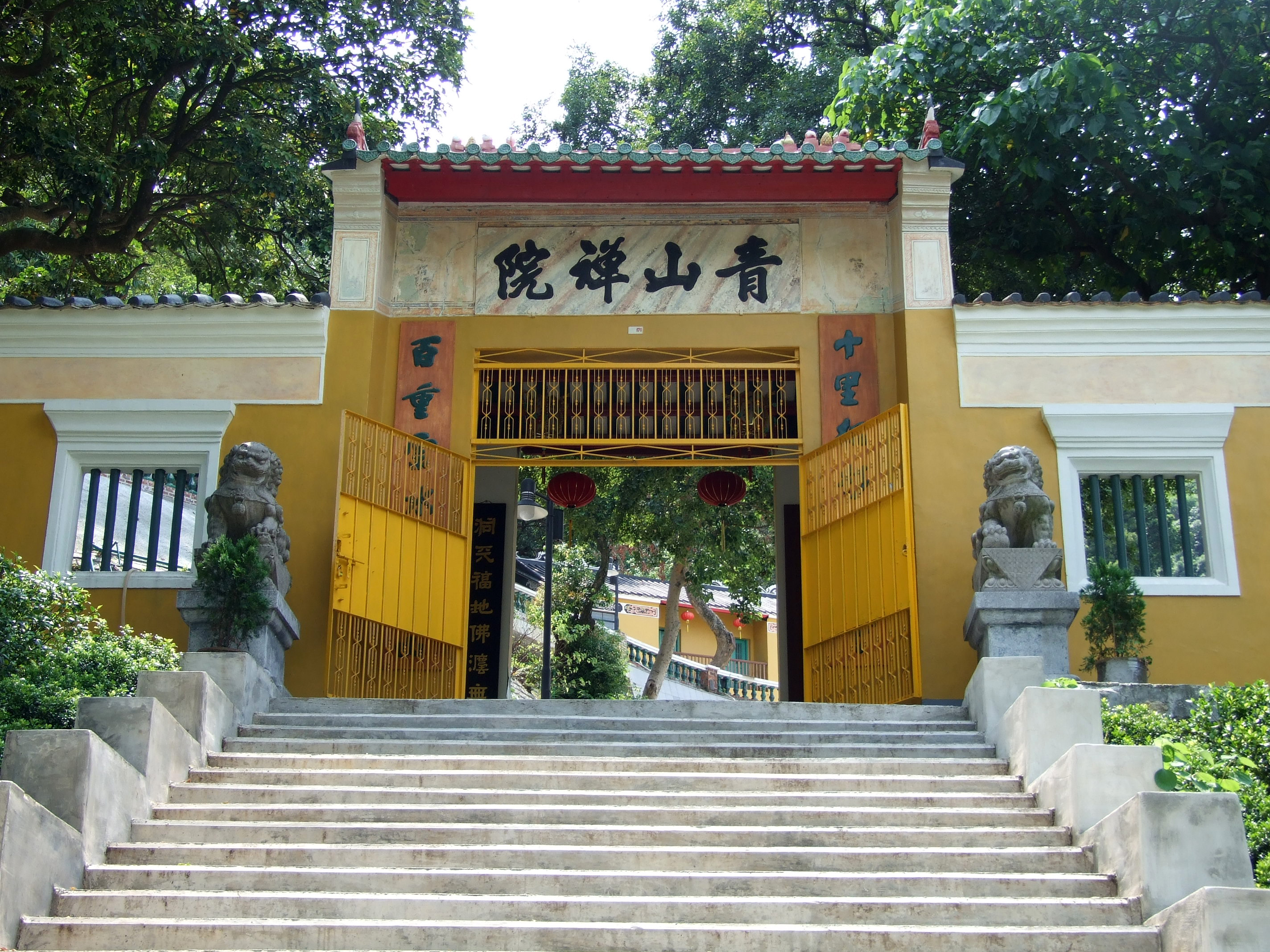 中文（香港）: 青山禪院復修後的山門